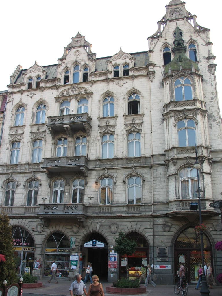 Kamienica Szai Goldbluma w Łodzi